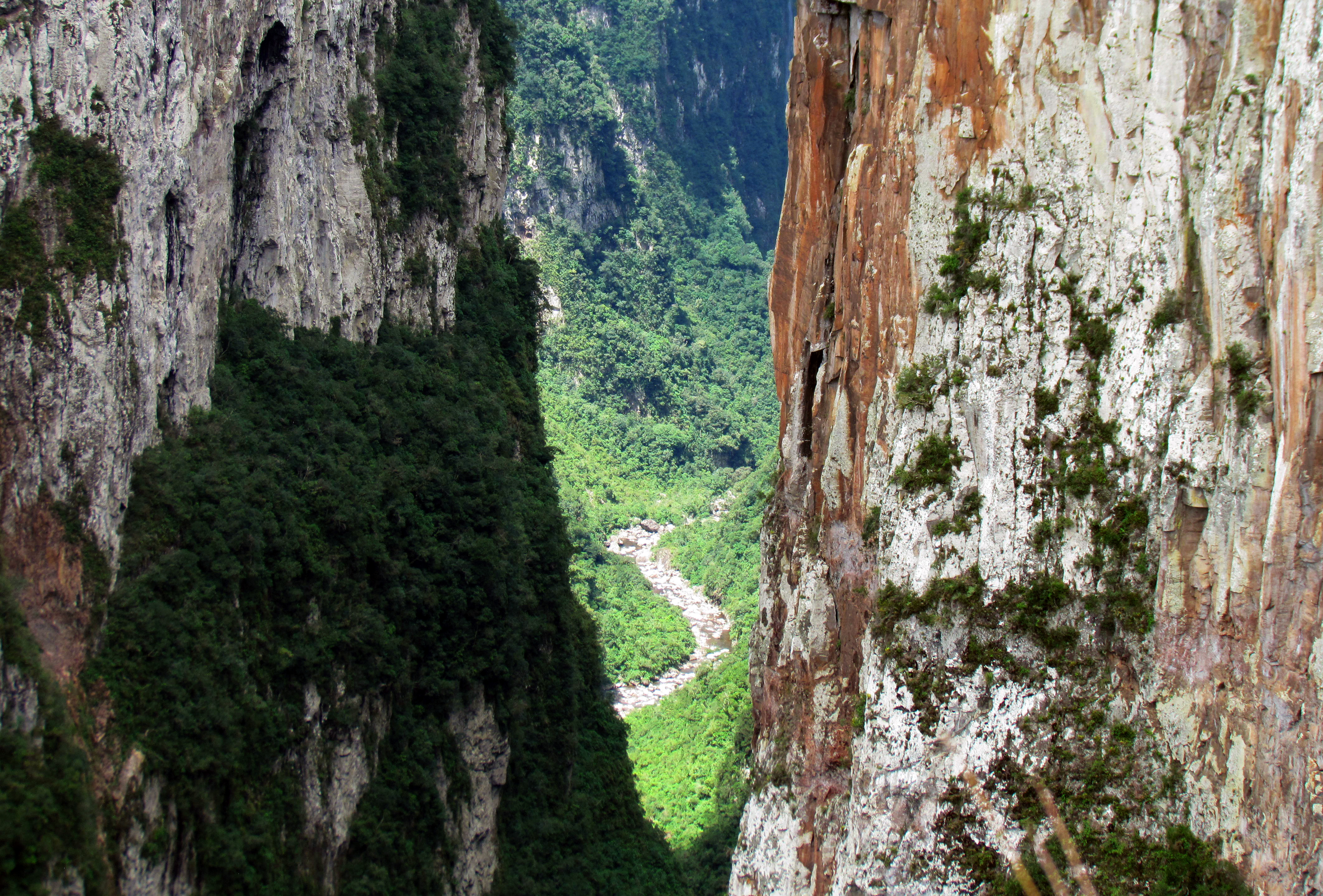 Formação geológica do Canyon Itaimbezinho